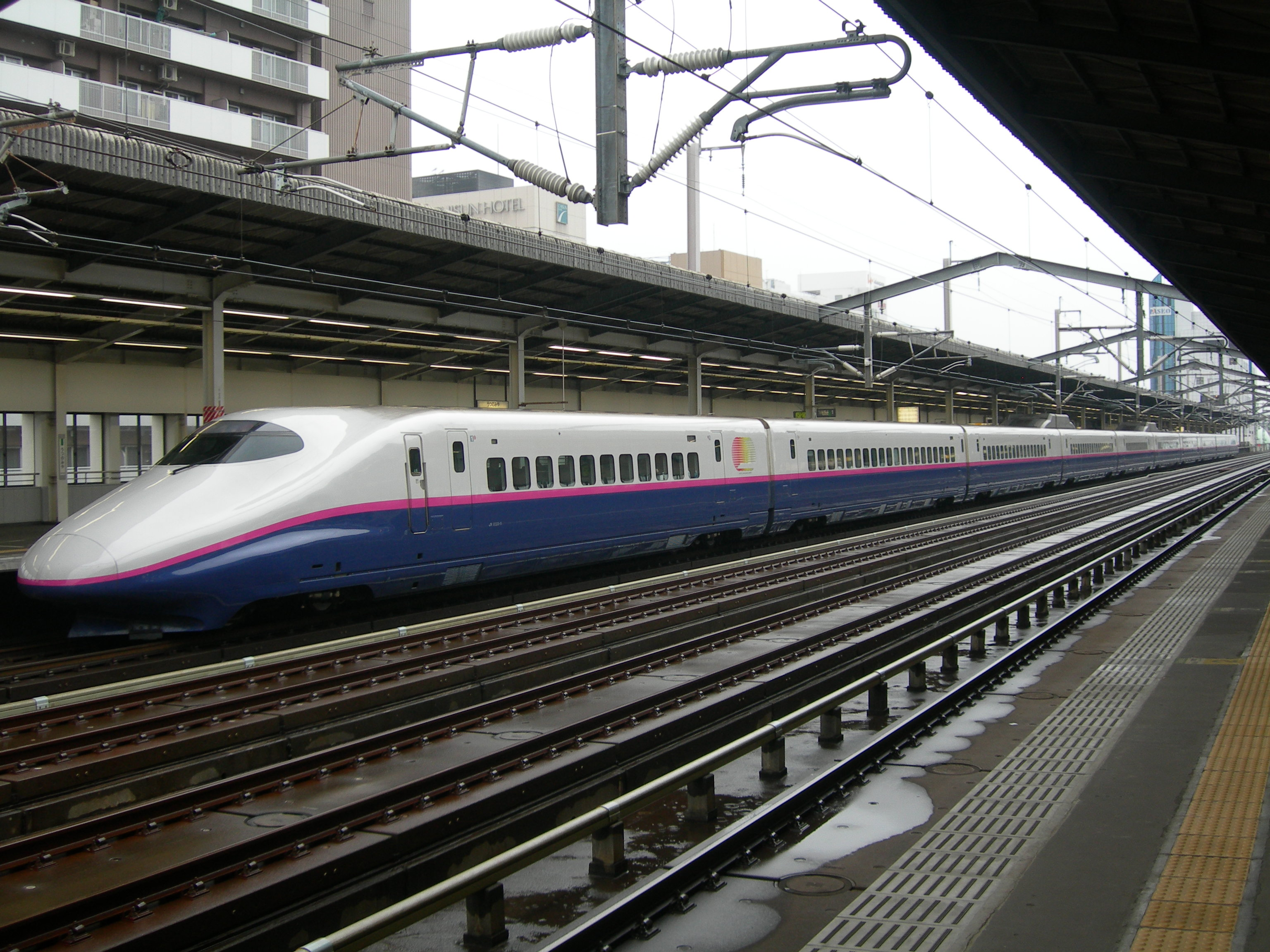 新幹線E2系電車0番台